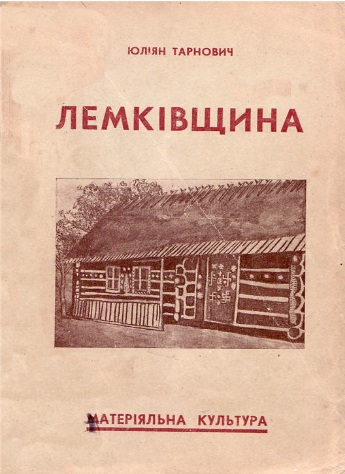 Обложка книжки Ю. Тарновича. «Лемківщина. Матеріяльна культура». Краков, «Українське видавництво», 1941